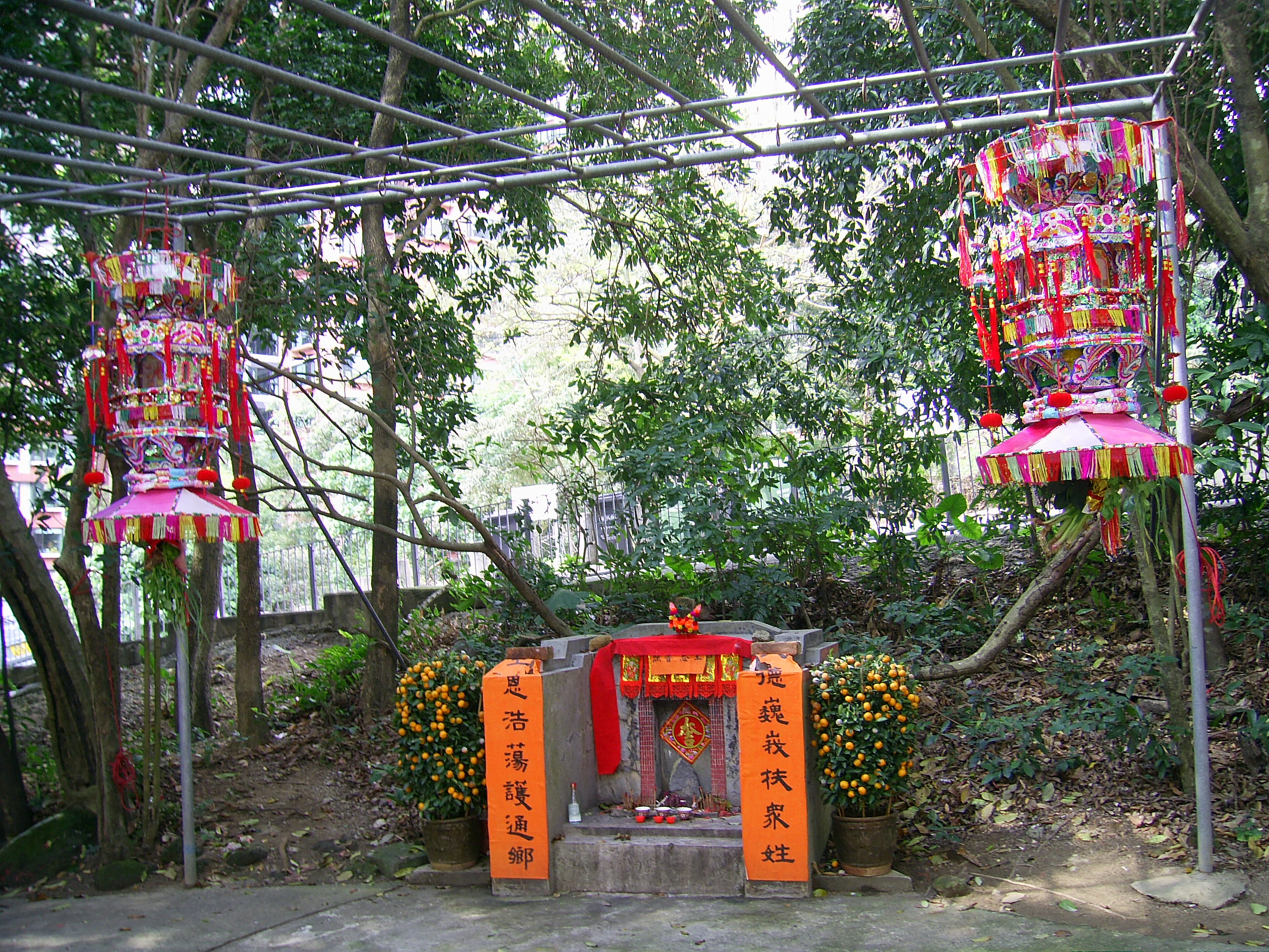 沙田客家村落點燈儀式